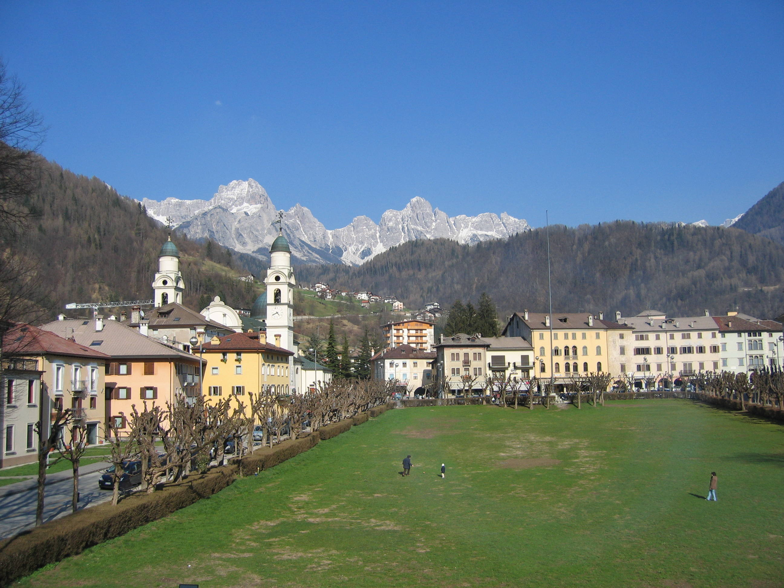 vista del centro del paese di Agordo (BL), Italia/Italy